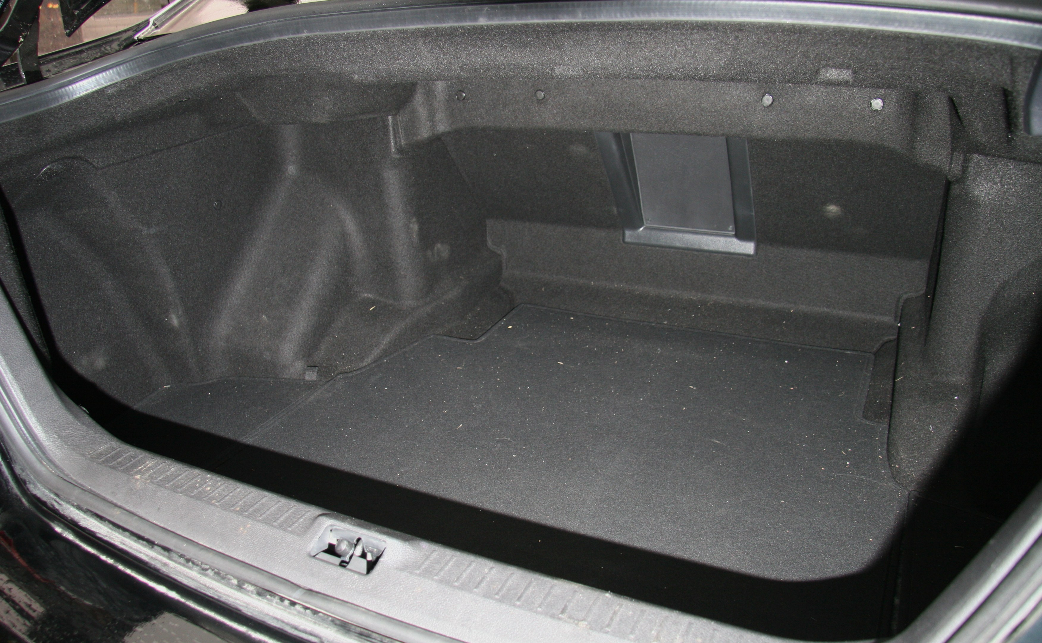 Nissan Fuga